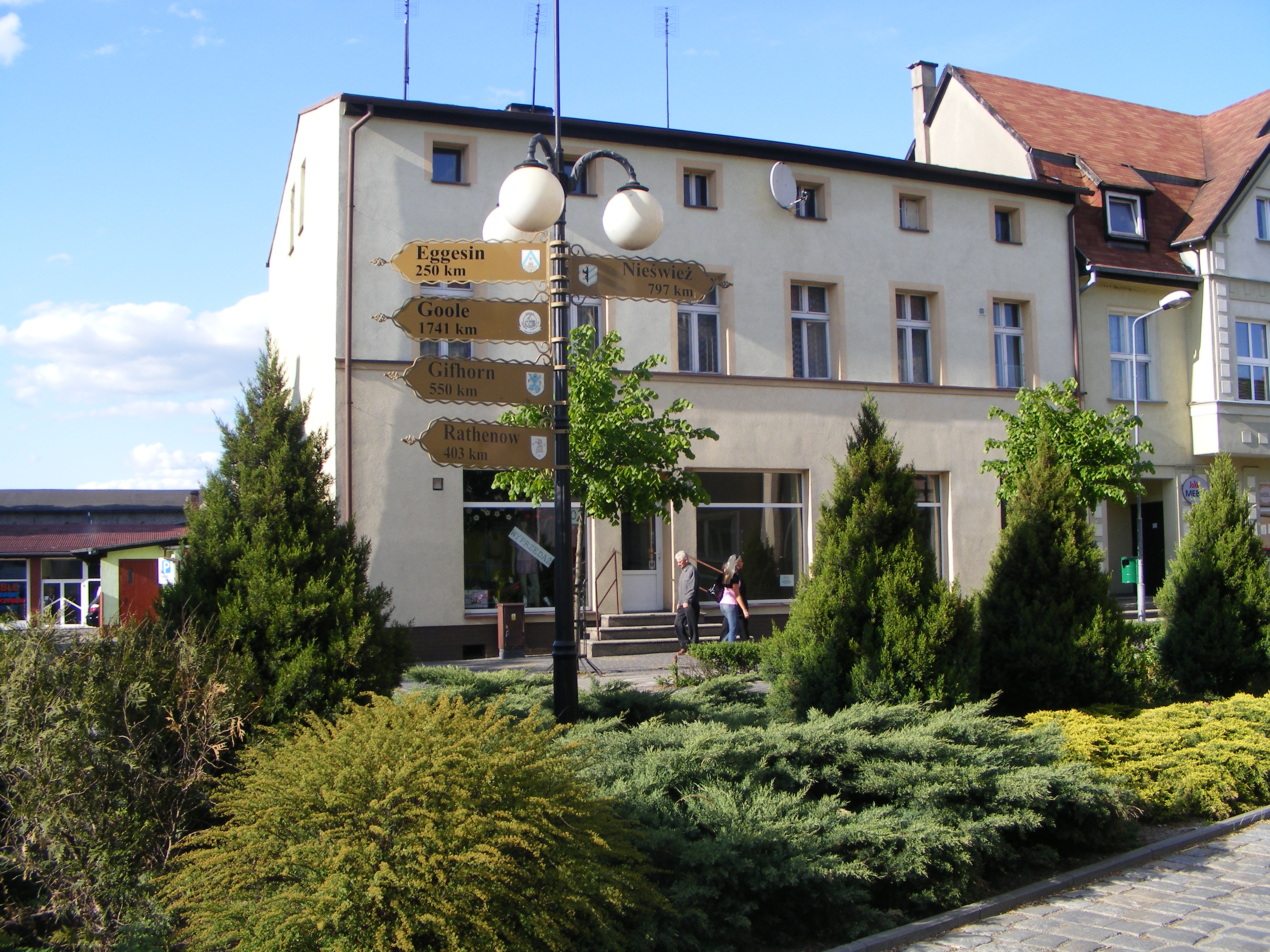 "Eurodrogowskaz".